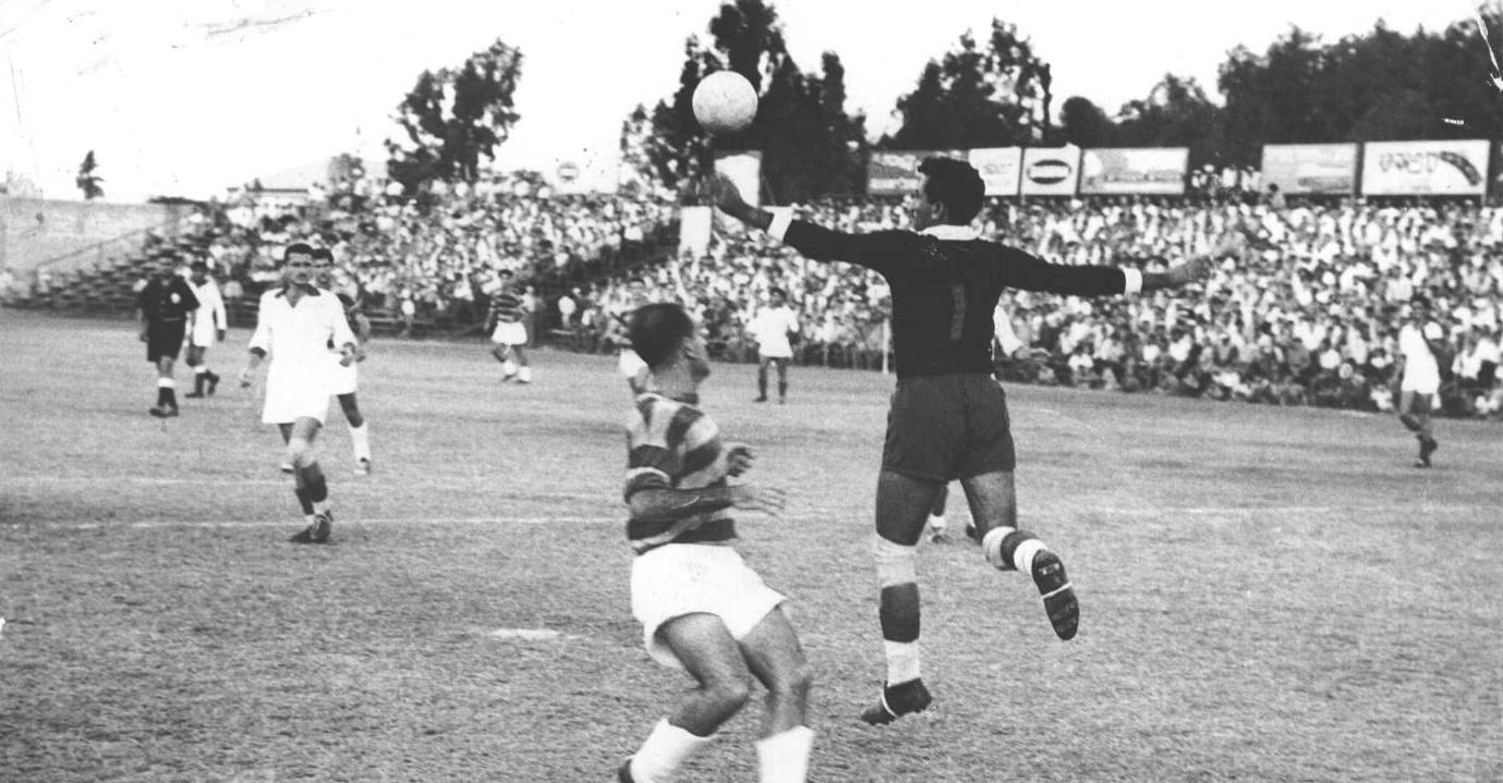 תמונה מארכיון של מנחם שירזי